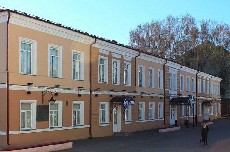 Мужчынская гімназія. Магілёў